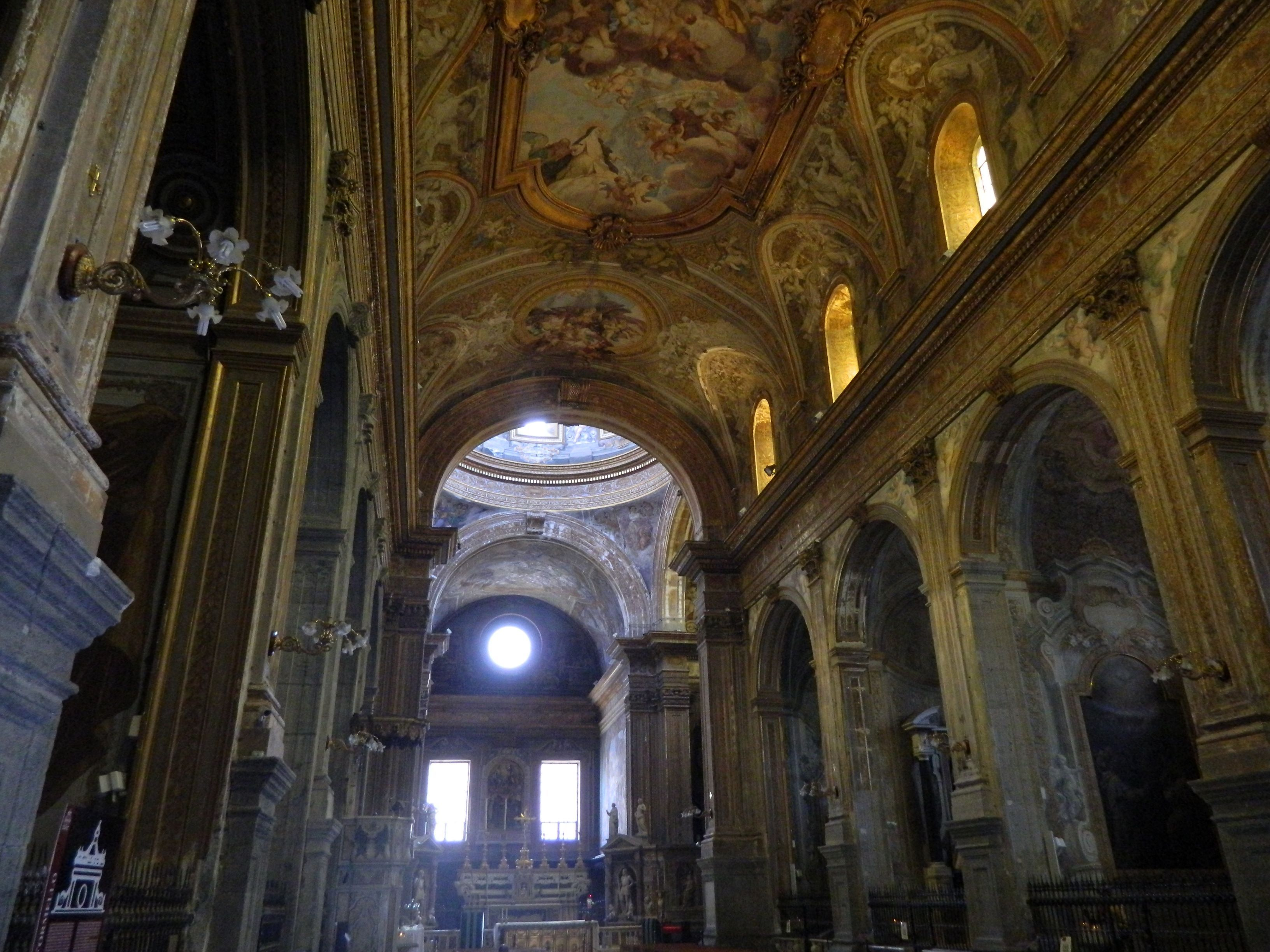 Chiesa di Santa Caterina a Formiello (Napoli) - la navata